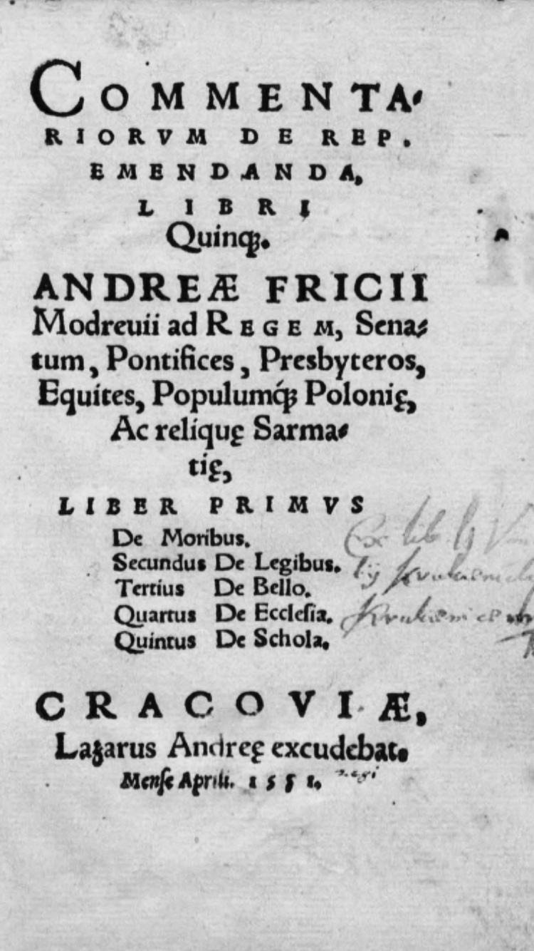 Commentariorum de Republica emendanda libri quinque Cracoviae 1551